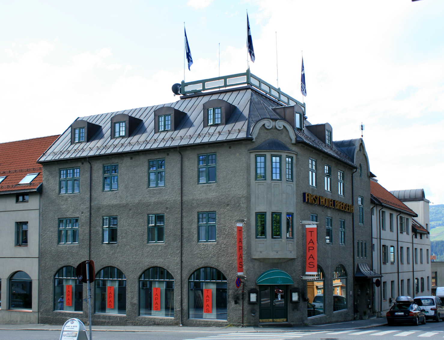 Breiseth Hotel, Lillehammer, Norway.